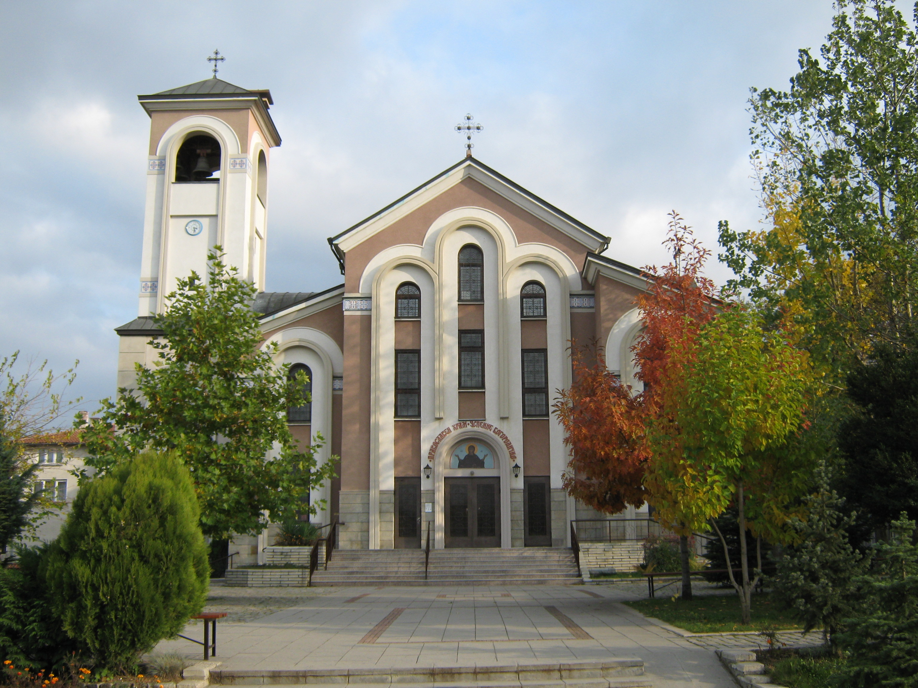 Катедрален храм "Успение Богородично", София